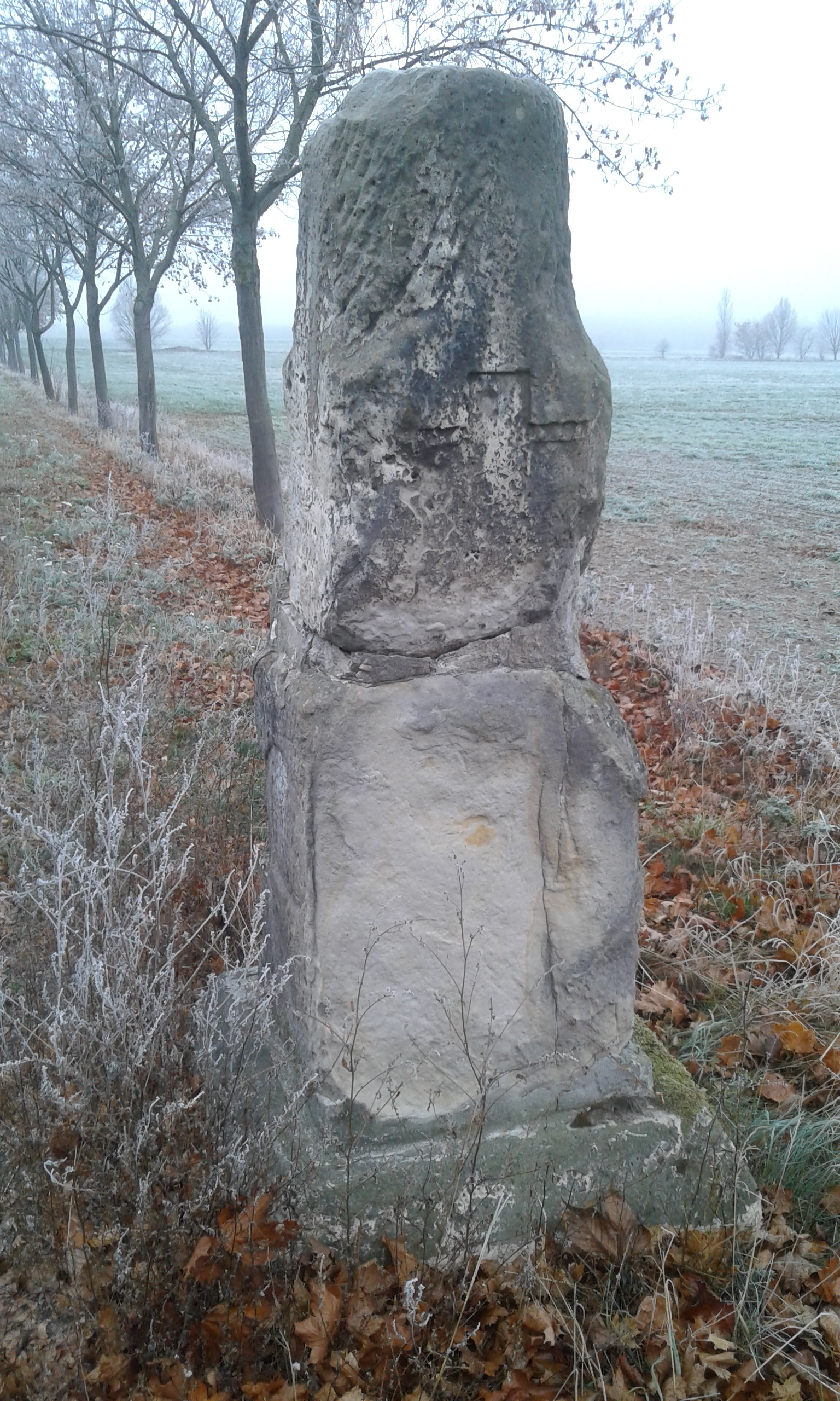 Meilenstein